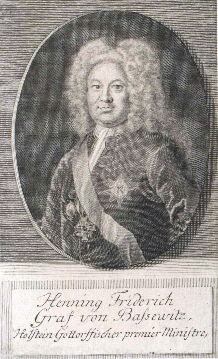 Graf Henning von Bassewitz Datum: Mitte 18. Jahrhundert Urheber: unbekannter Maler Quelle: Zieladresse des Bildes